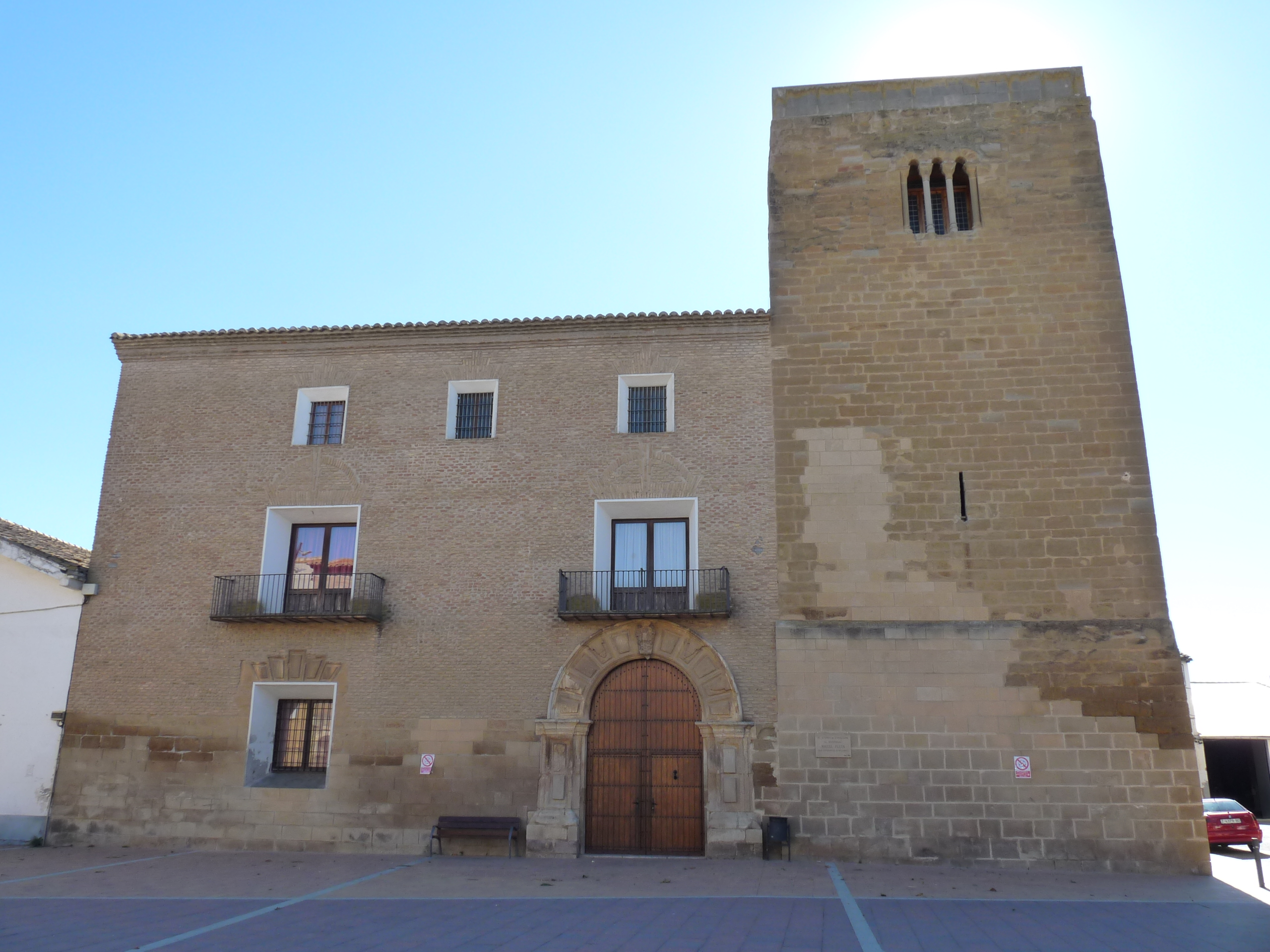 Albalate de Cinca - Palacio ducal de Solferino (s. XVII)